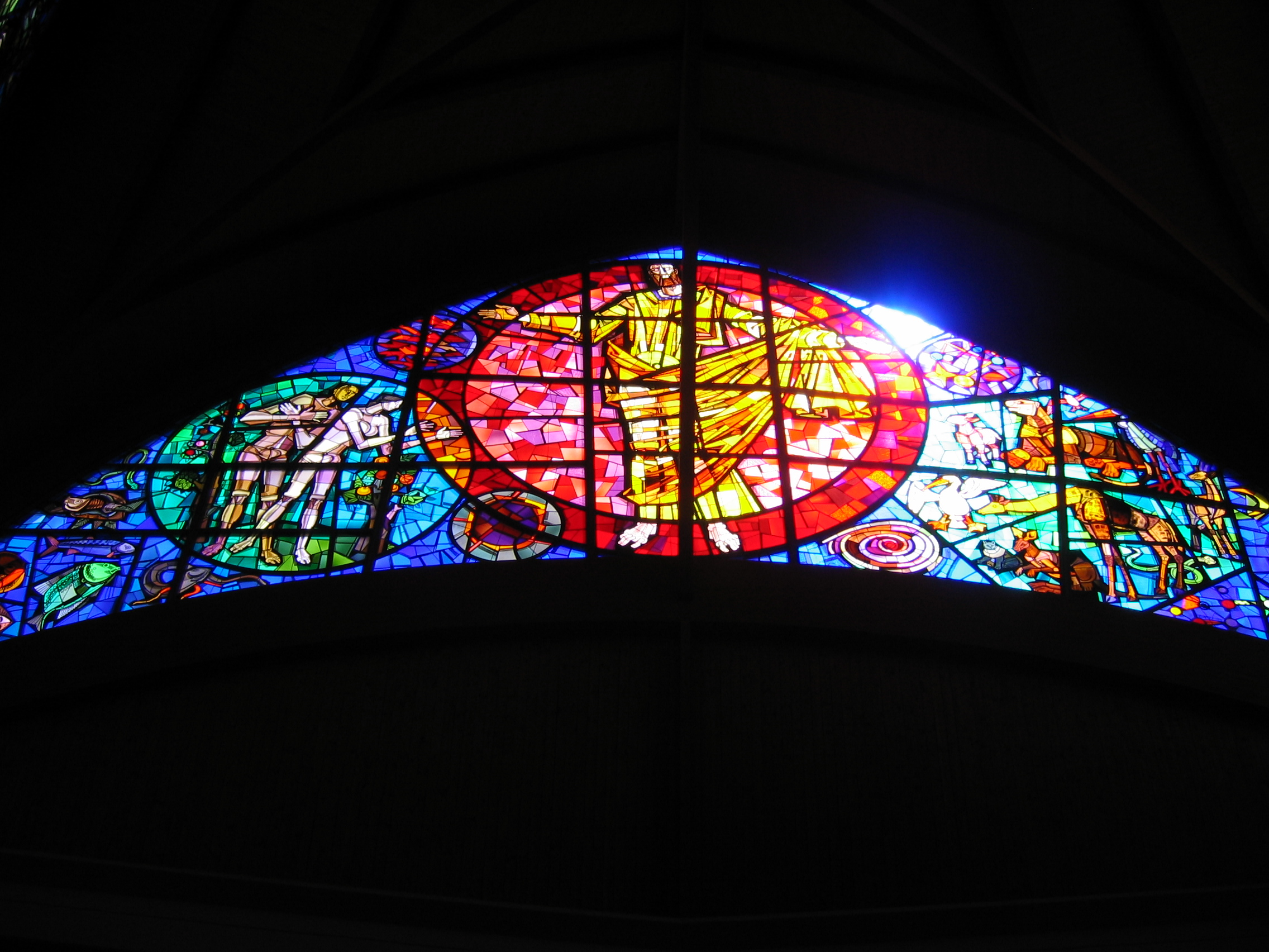 Vetro all'intero del santuario di Paola